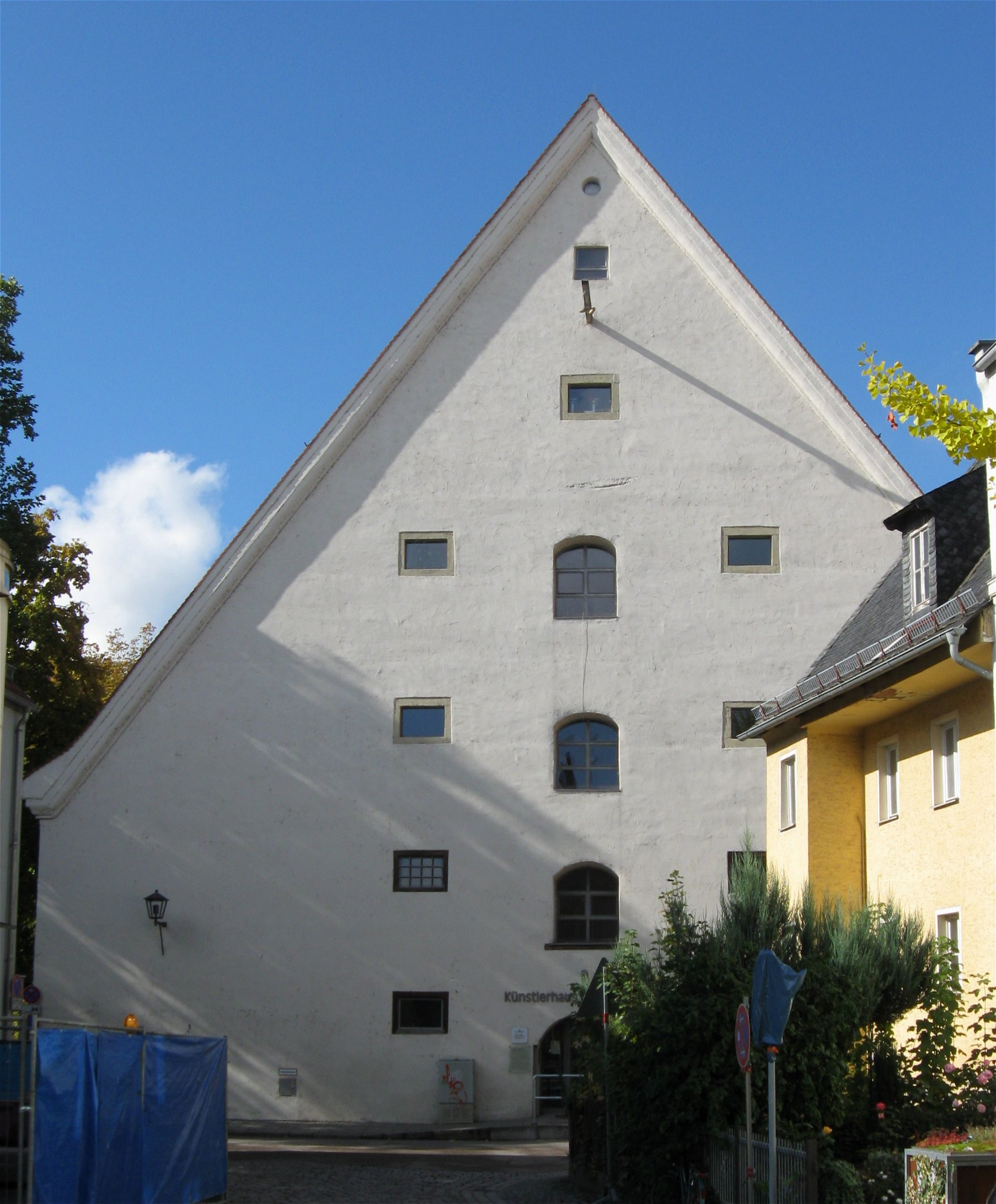 Andreasstraße 26, 28; Ehem. Bayerischer Salzstadel (sog. Andreasstadel), zweigeschossiger und traufständiger Steilsatteldachbau, 16. Jh.